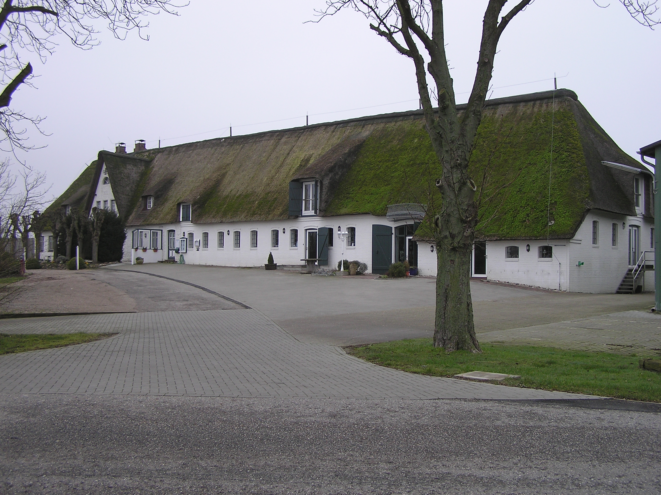 Farisæergård på Nordstrand.